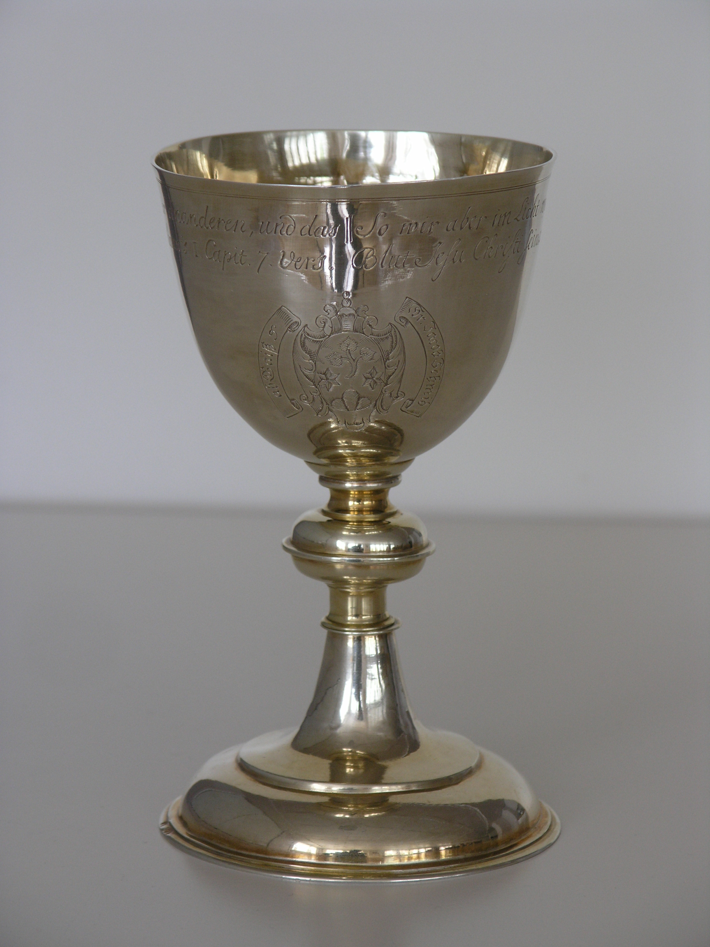 Abendmahlskelch, datiert 1750, vom Goldschmied "TS" in Herisau